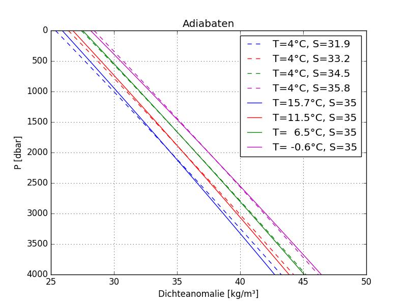 Adiabatenkurven von (Meeres-)wasser mit unterschiedlichen Temperatur- und Salinitätseigenschaften Die Adiabatenkurven zeigen die Dichte, die ein Wasserpaket annimmt, wenn es durch Aufsteigen oder Absinken adiabatisch auf einen anderen Druck gebracht wird. Da die Dichte von Meereswasser von Temperatur und Salinität abhängig ist, verlaufen die Adiabatenkurven nicht parallel. In den dargestellten Beispielkurven sind die Dichten von jeweils zwei Wassertypen (durchgezogene und gestrichelte Linie) bei einem Druck von ungefähr 2000 dbar gleich groß. Darüber (darunter) hat der eine Typ eine größere (kleinere) Dichte als der andere. Dadurch wird die Schwierigkeit, einen geeigneten Normaldruck zu wählen, um die potentielle Dichte beider Wassertypen zu vergleichen, deutlich.